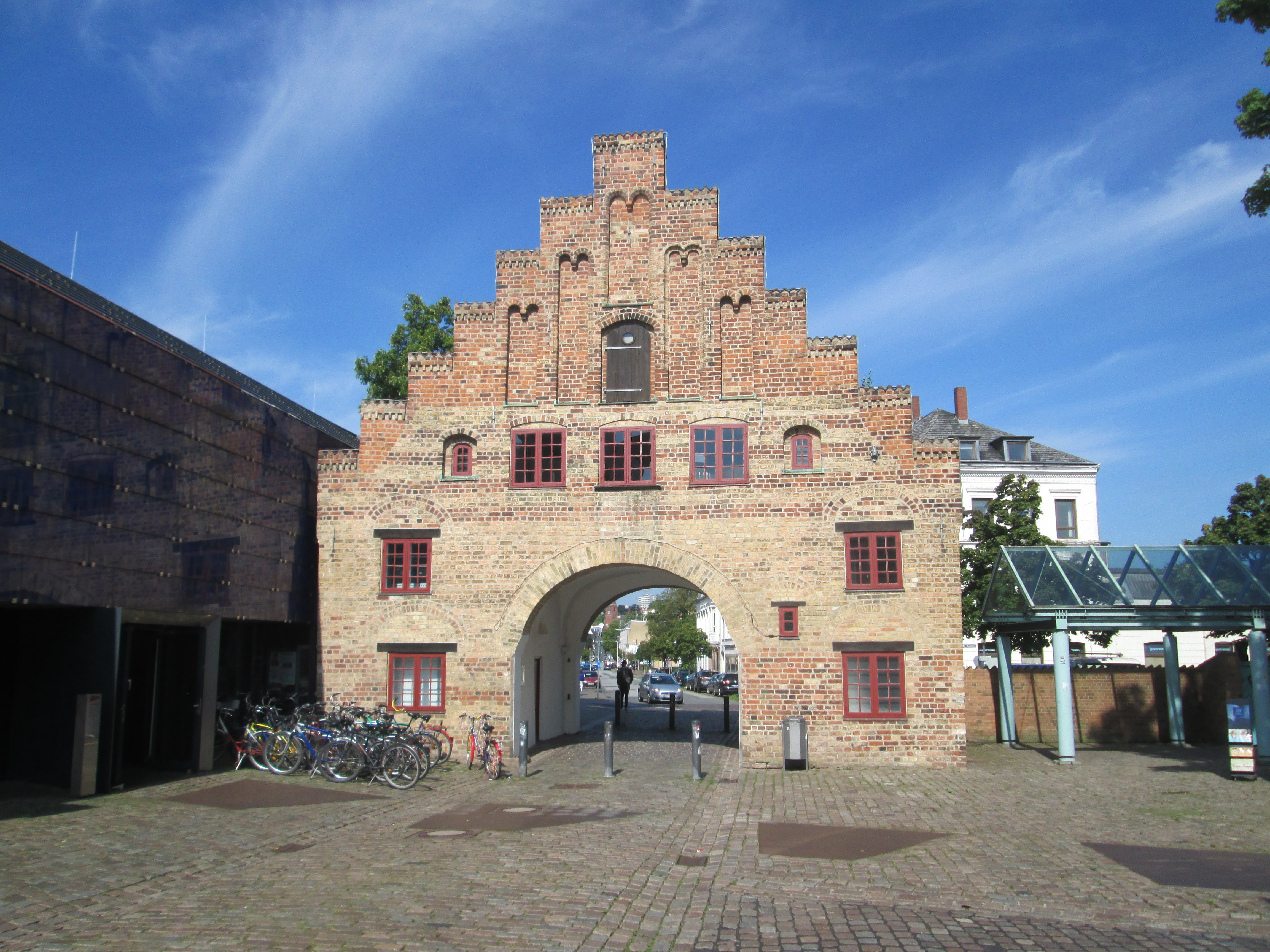 Nørreport / Nordertor i Flensborg